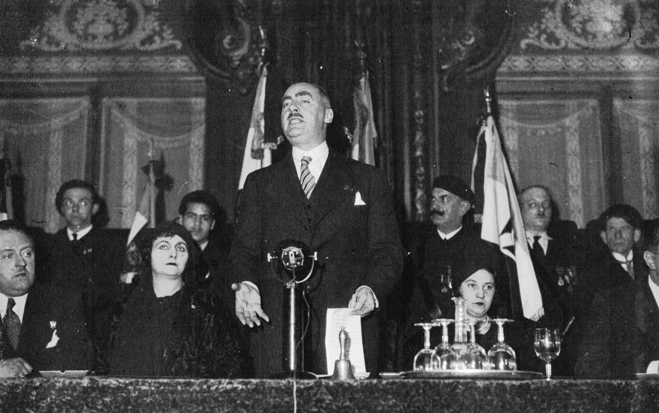 Meeting, salle Wagram : Taittinger, président des Jeunesses Patriotes : photographie de presse